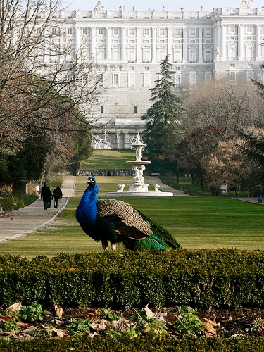 Campo del Moro Gardens, Royal Palace of Madrid. Spain